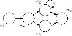 Kripke frame example